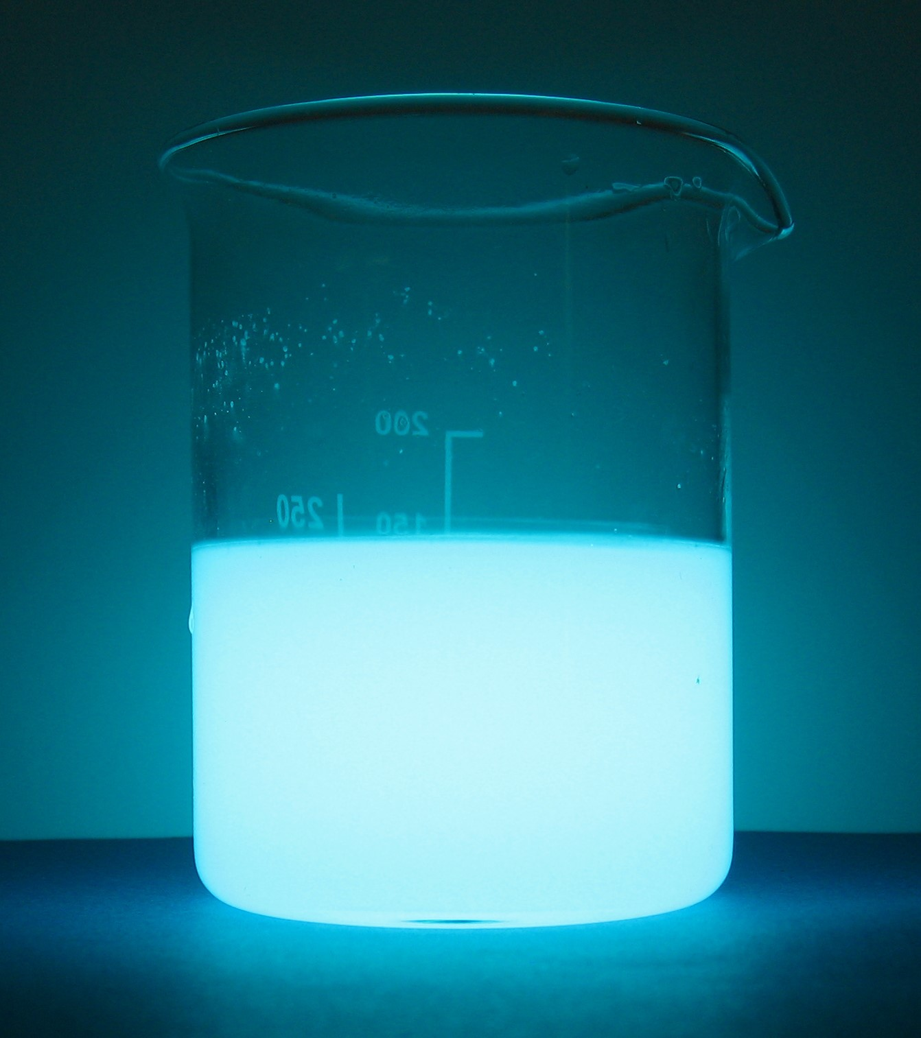 Luminol mit Waschmittel, rotem Blutlaugensalz und Soda